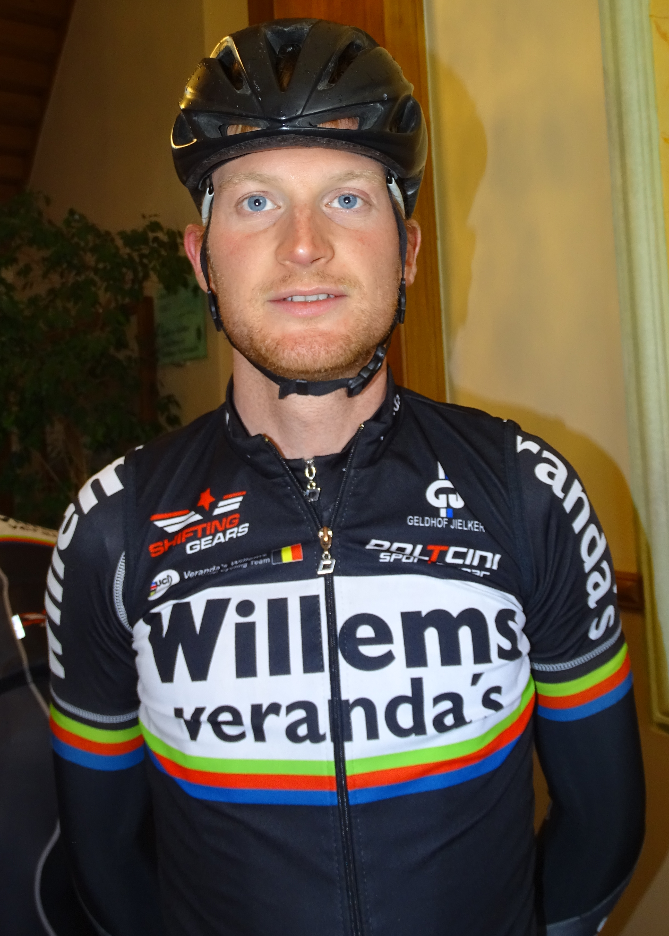 Reportage réalisé le dimanche 26 juillet à l'occasion du départ et de l'arrivée du Grand Prix de la ville de Pérenchies 2015 à Pérenchies, Nord, Nord-Pas-de-Calais, France.